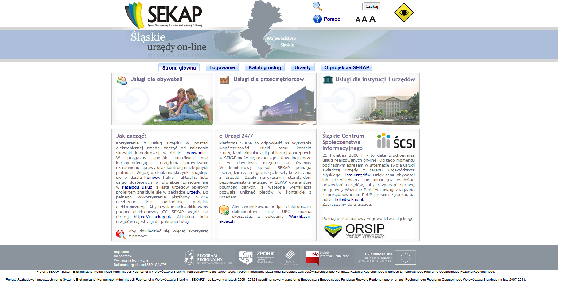 System Elektronicznej Komunikacji Administracji Publicznej